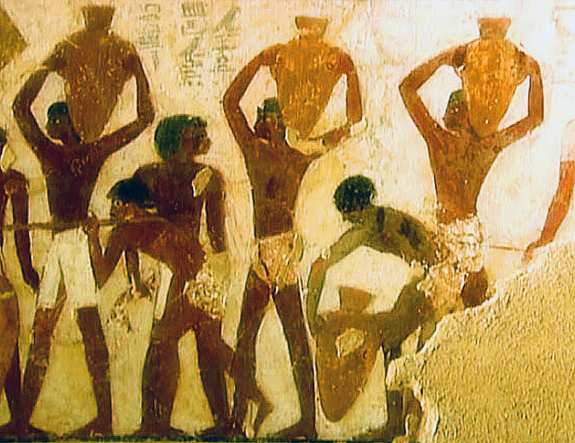 Transport du vin en amphores dans l'Égypte antique